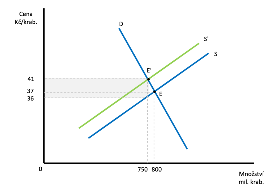 Efekt uvalení spotřební daně, šedý obdélník ukazuje příjem státu z této daně